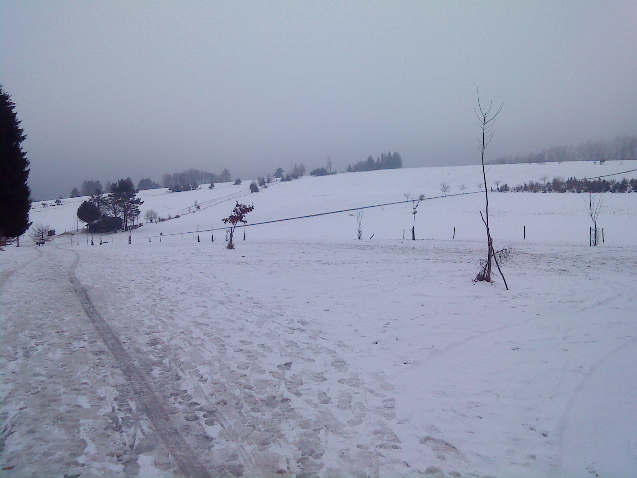 Die Skiabfahrt auf dem Engländer bei Heigenbrücken-Jakobsthal